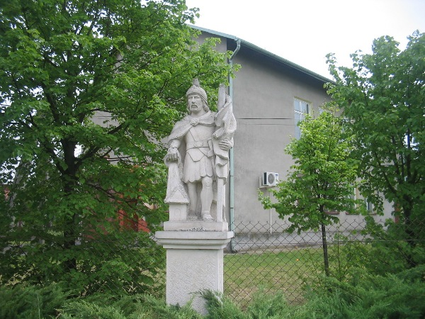 Figura Św. Floriana przed budynkiem OSP Bucze.